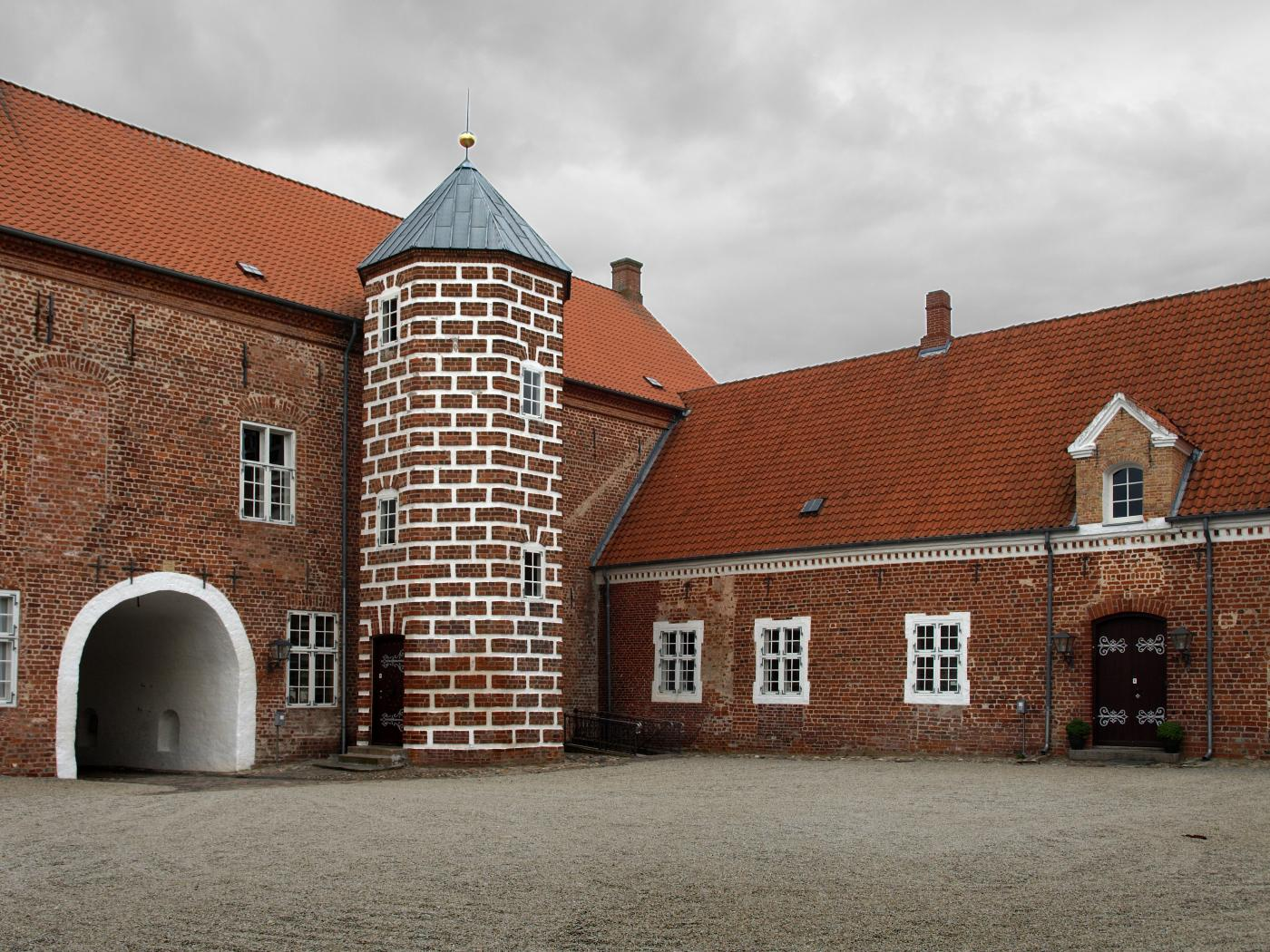 Dänemark Saeby (Nordjütland), Saebygaard Innenhof, Foto 2013